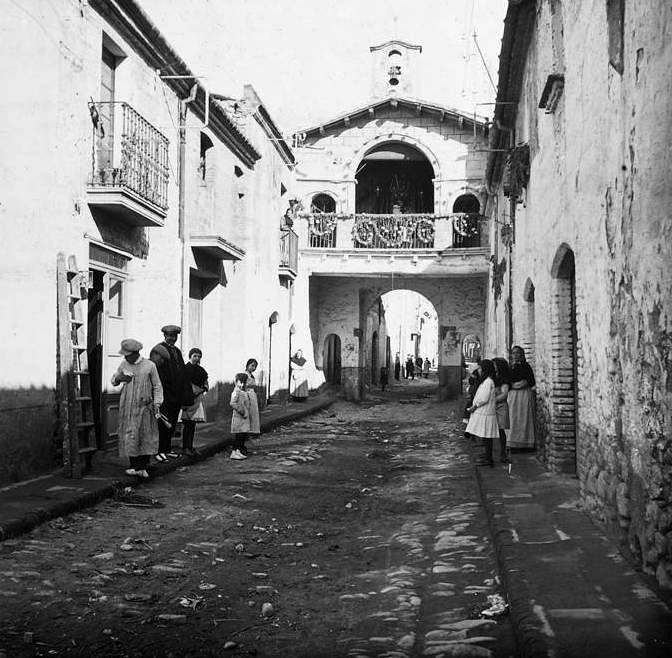 Capella i carrer de Granollers. Josep Salvany i Blanch (1915)